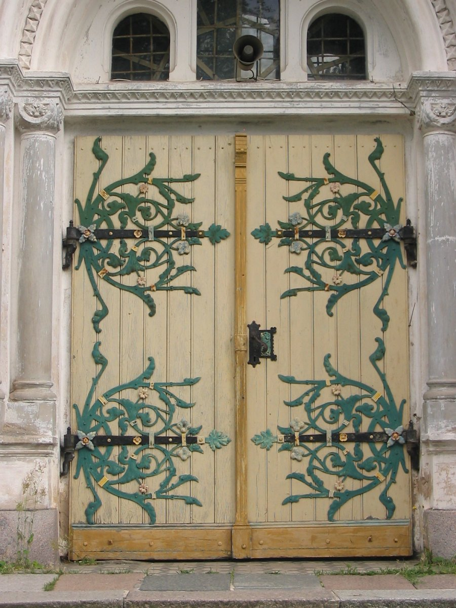 Слабодка. Мастацкія завесы касцёла. Пачатак 19 ст.